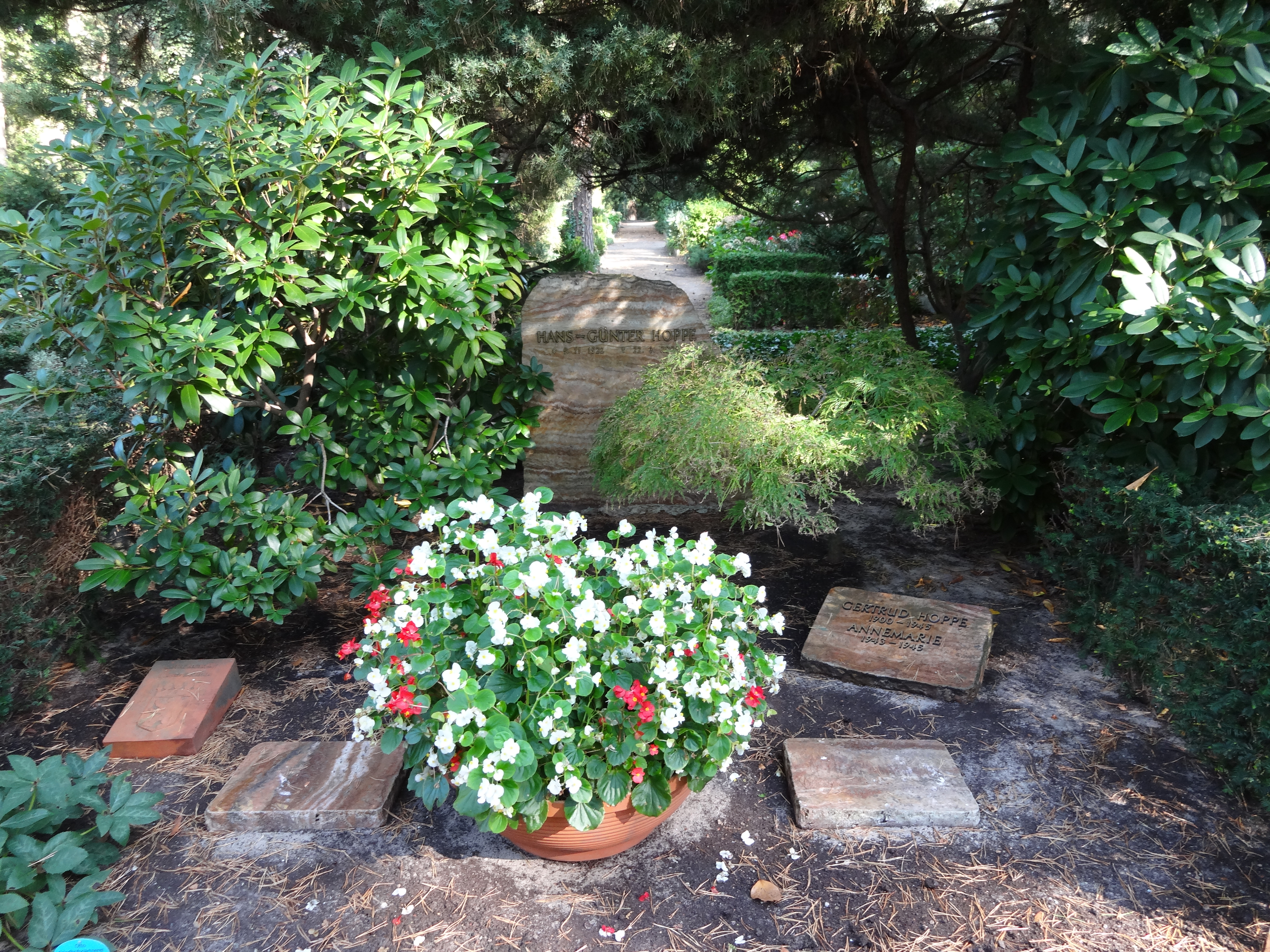 Ehrengrab für Hoppe, Hans-Günter auf dem Waldfriedhof Dahlem; der Friedhof ist ein Gartendenkmal in BerlinThis is a photograph of an architectural monument.